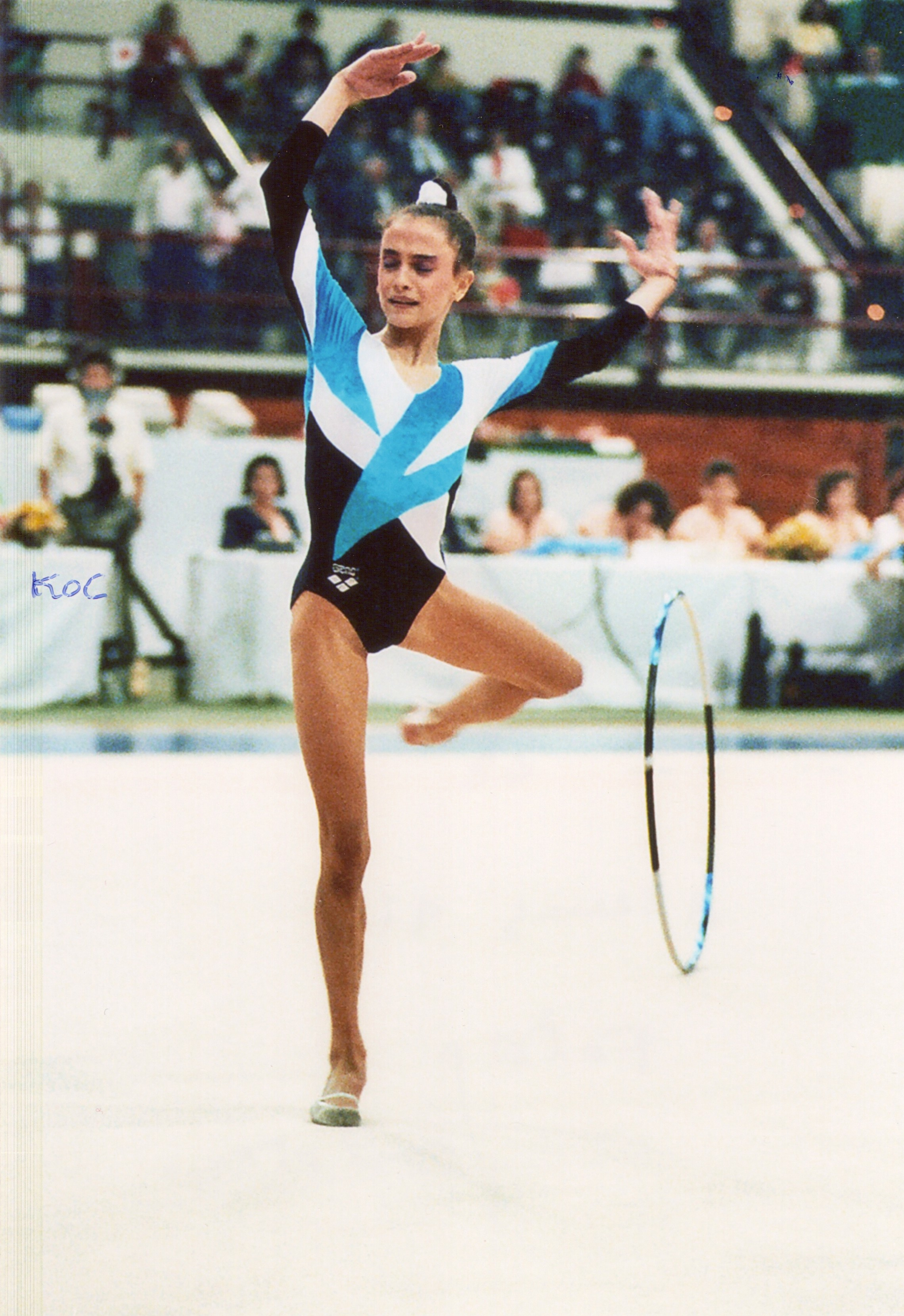 Carolina Pascual en el Campeonato Mundial de Gimnasia Rítmica de 1991 en Atenas.